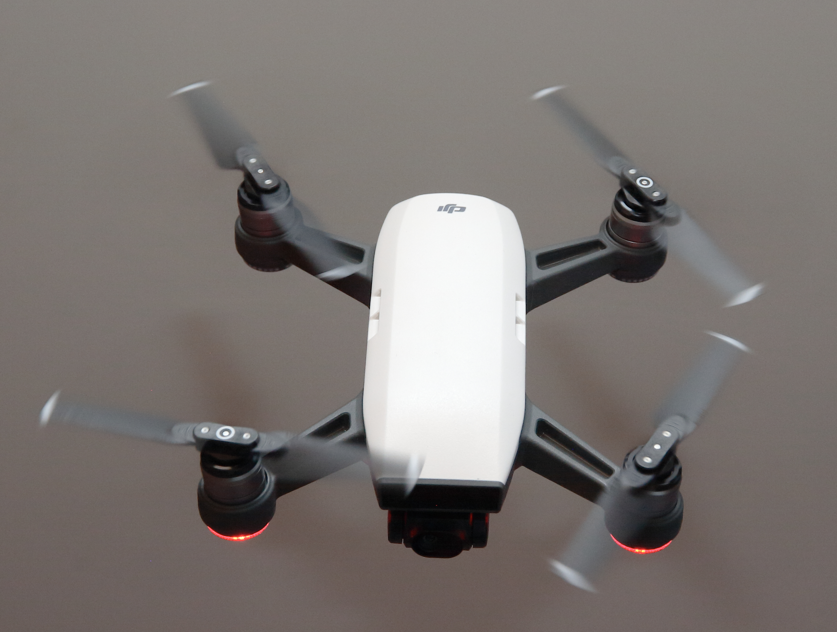 DJI Spark im Flug, von oben